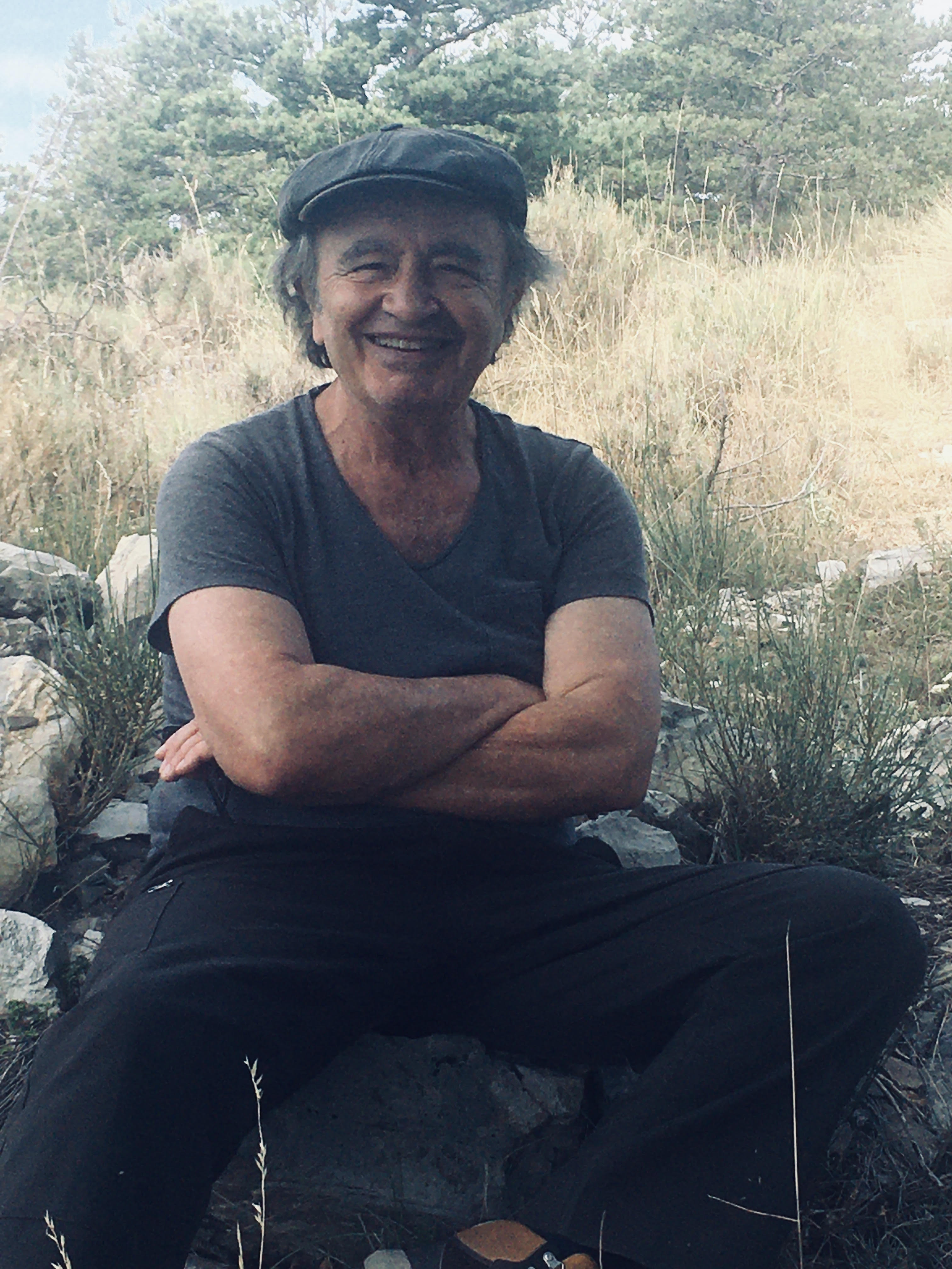 Jean-Pierre Boudine, sur la montagne de La Reynière, 13 août 2020